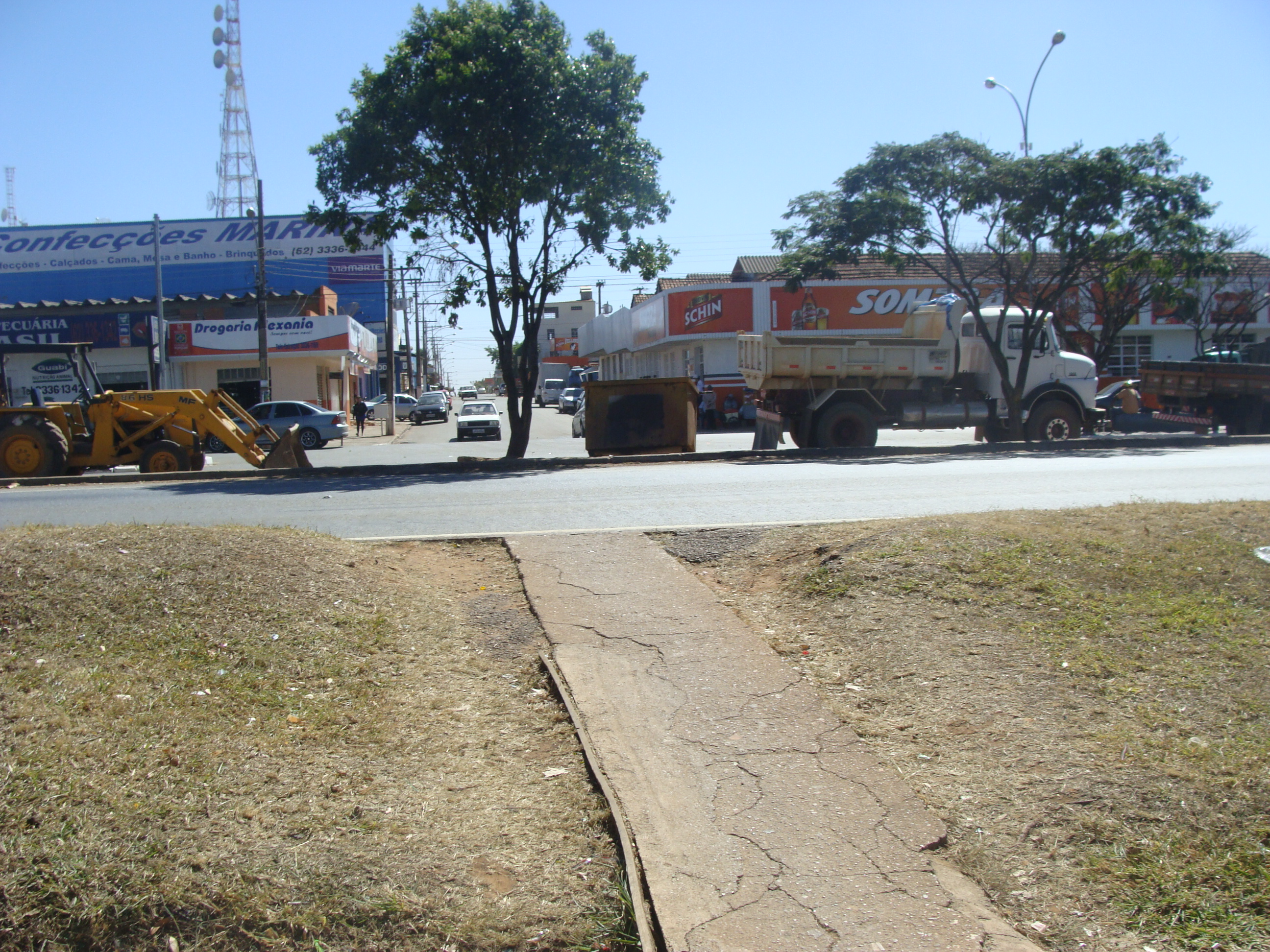 Travessia da BR-060, entrada de Alexânia, Goiás.